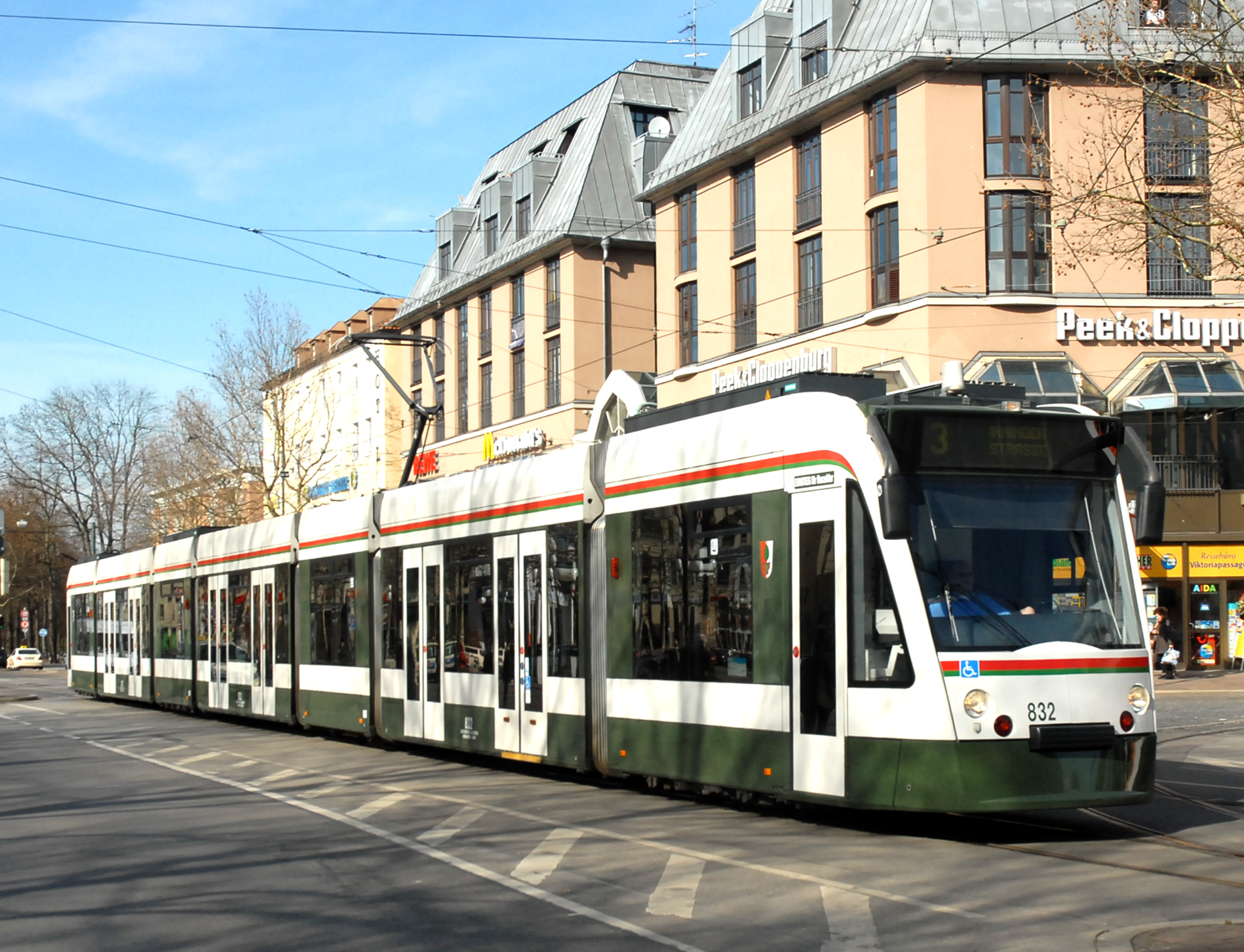 Stadtwerke Augsburg Verkehrsgesellschaft mbH (StwA) tram 832 van het Siemens type Combino I te Augsburg.